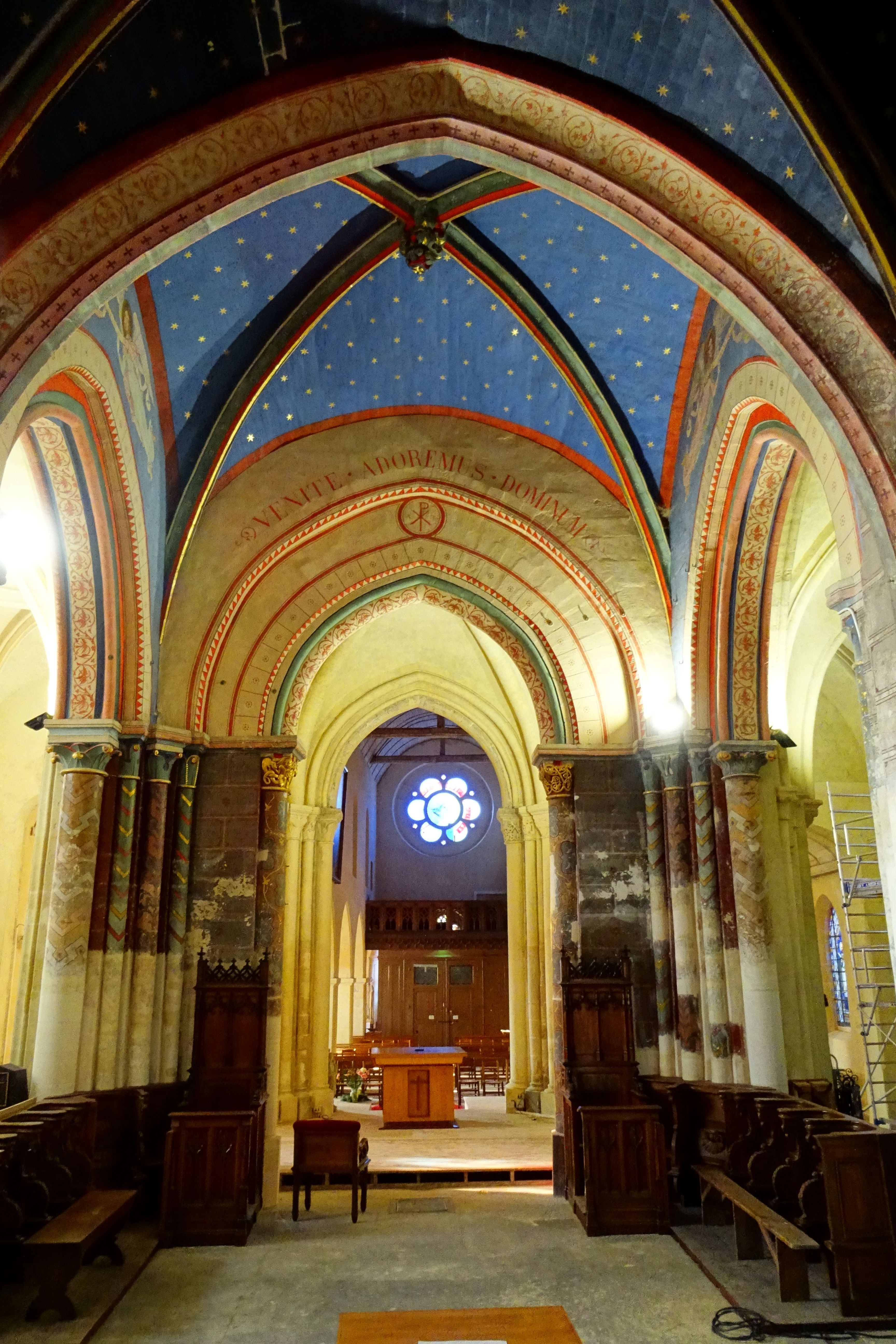 Intérieur de l'église - voir le titre du fichier.